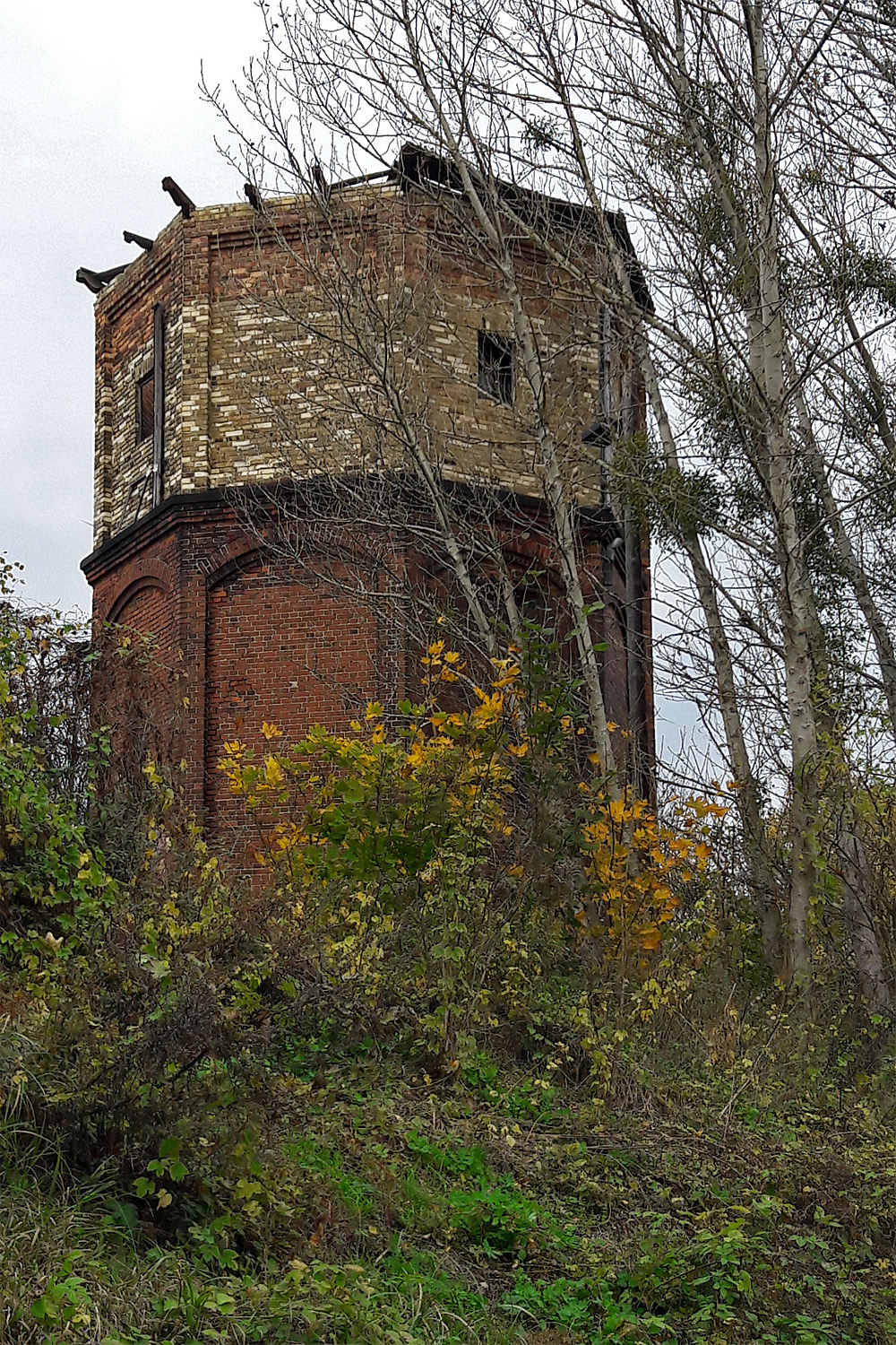 Wasserturm am Stellwerk Eilenburg